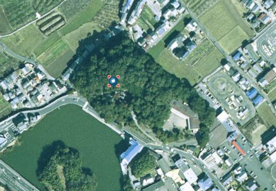 Susa jinjya